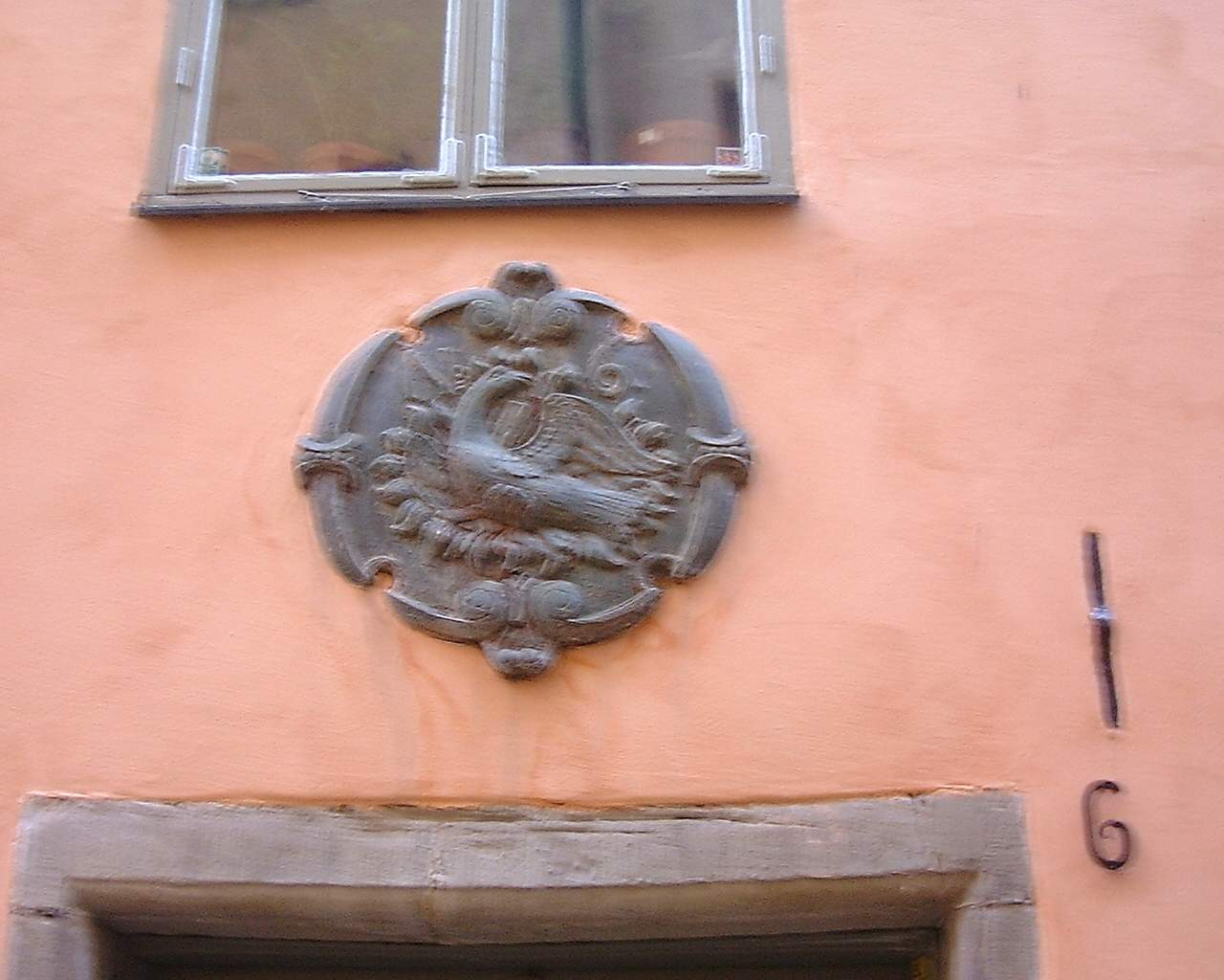 Sign at 6-8, Österlånggatan, Gamla stan, Stockholm.